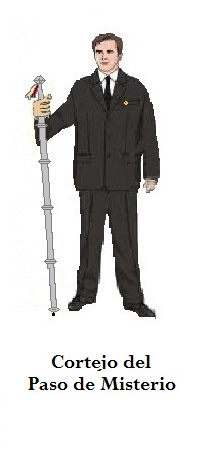 Hábito del Cortejo del Soberano Poder